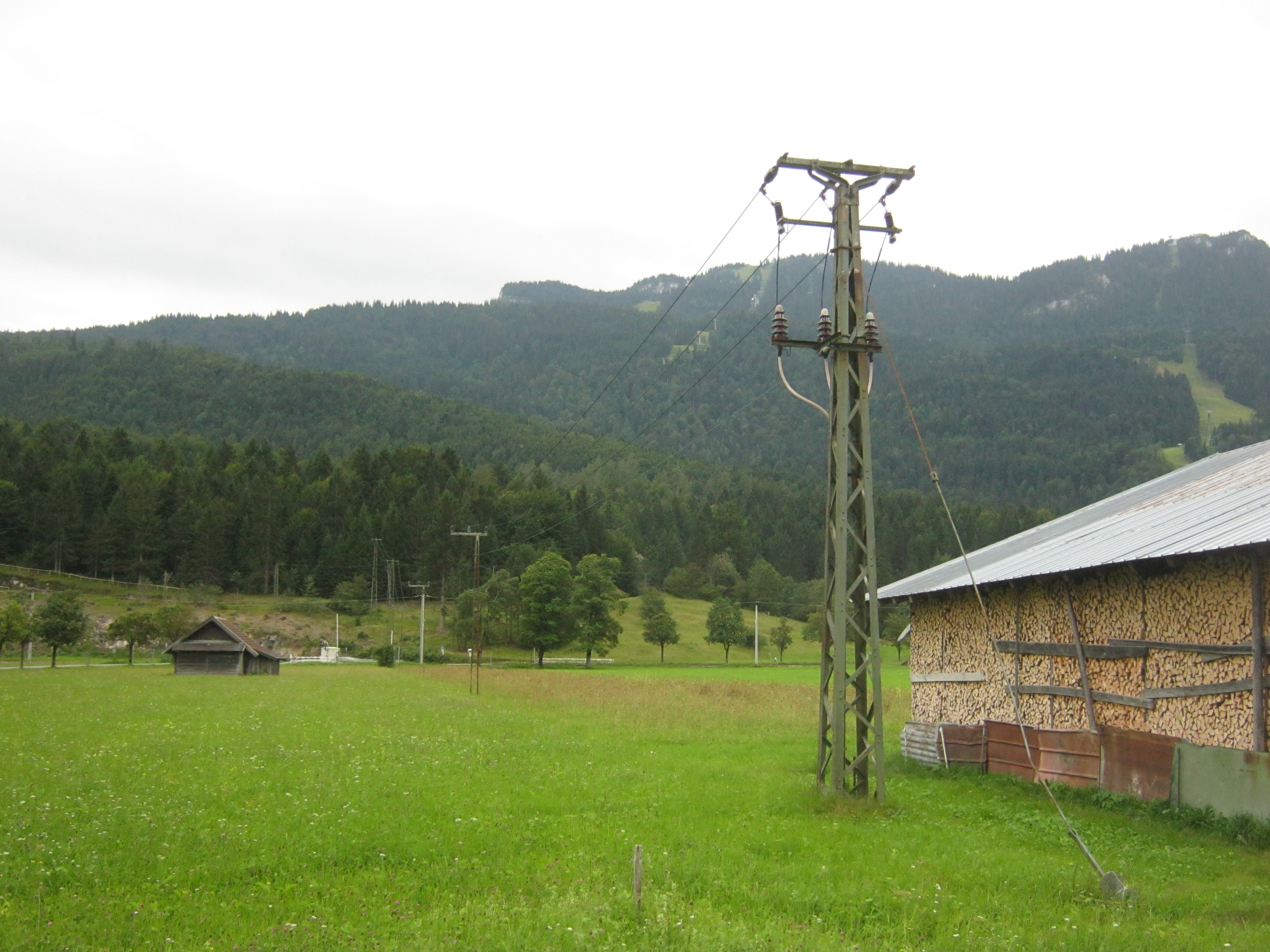 Mittelspannungsleitung zur Stromversorgung der Zugspitzbahn; Garmisch-Partenkirchen